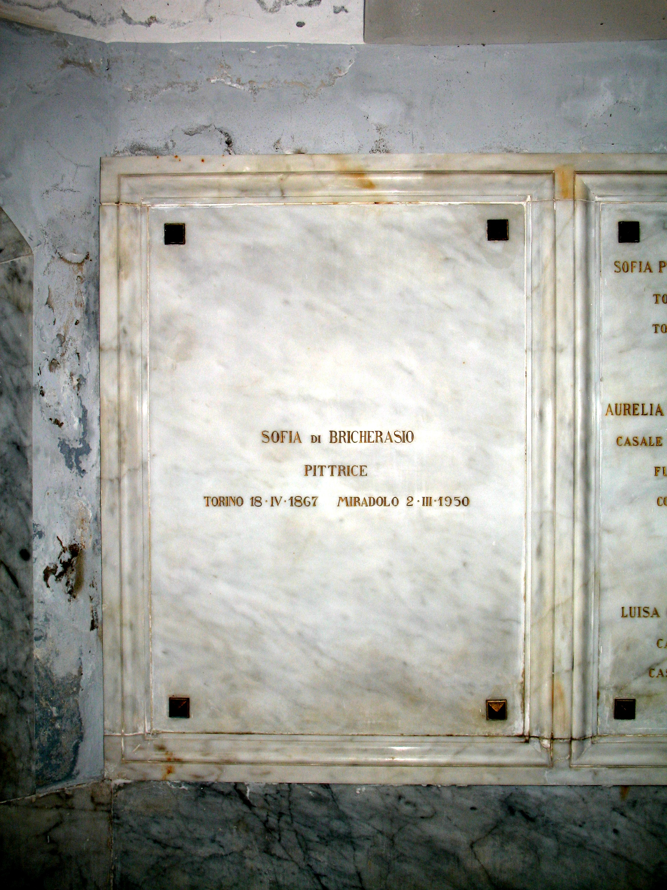 Lapide funeraria della pittrice Sofia di Bricherasio, cappella Bricherasio, a Fubine, Alessandria, Italia.